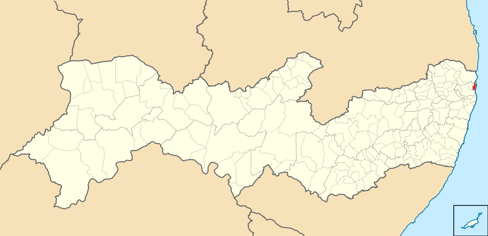 Mapa Itamaracá